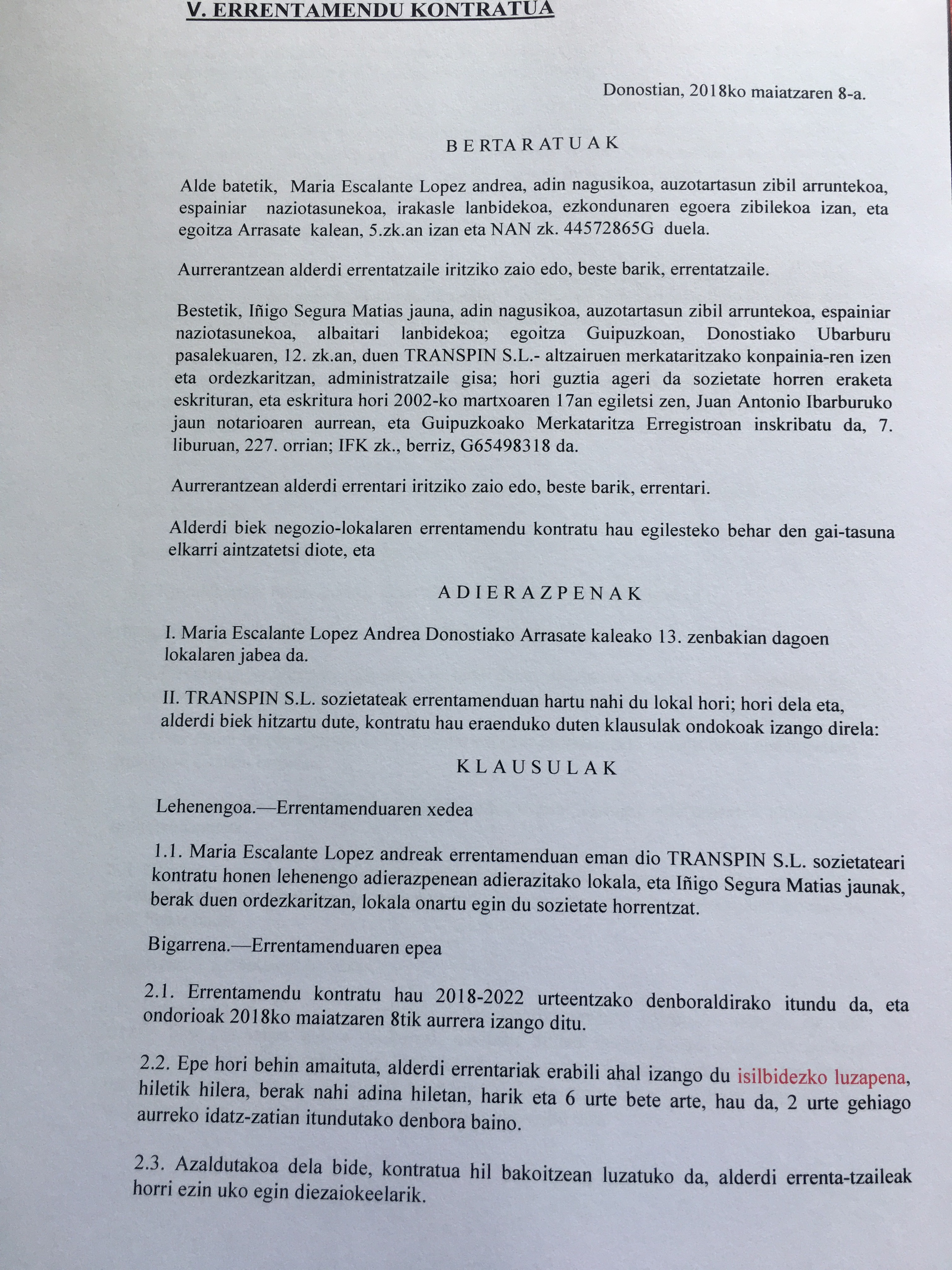 Errentamendu kontratuaren eredua